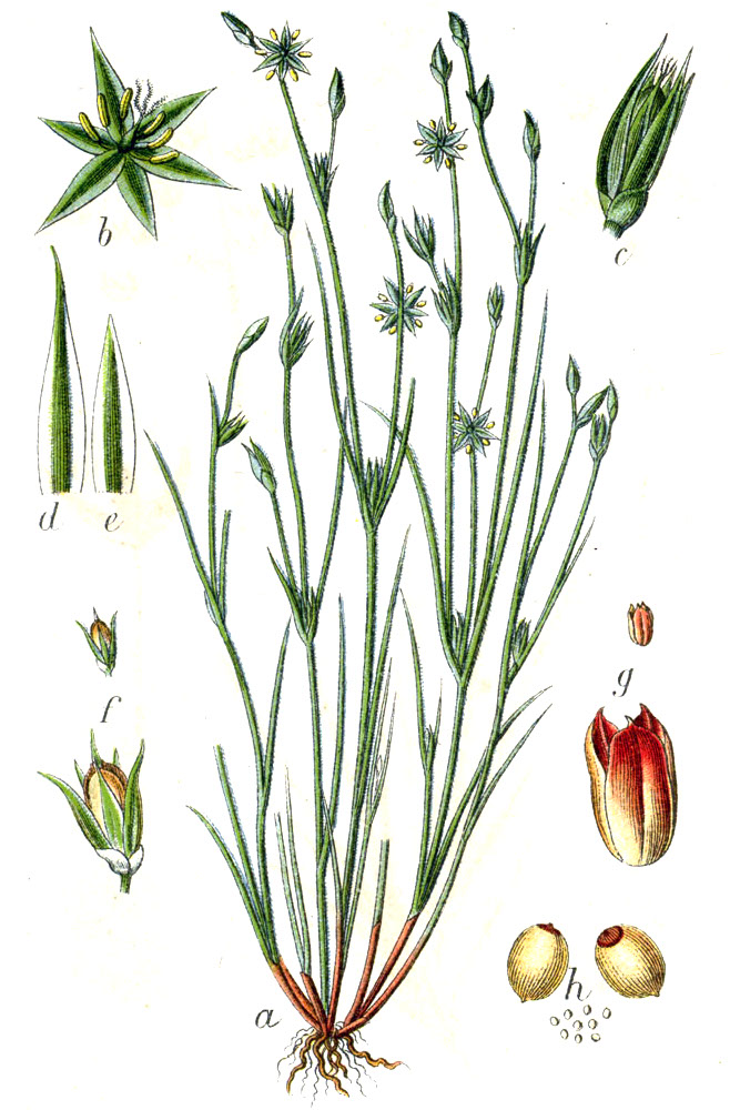 Juncus bufonius L. Original Caption Gemeines Schweinegras, Juncus bufonius